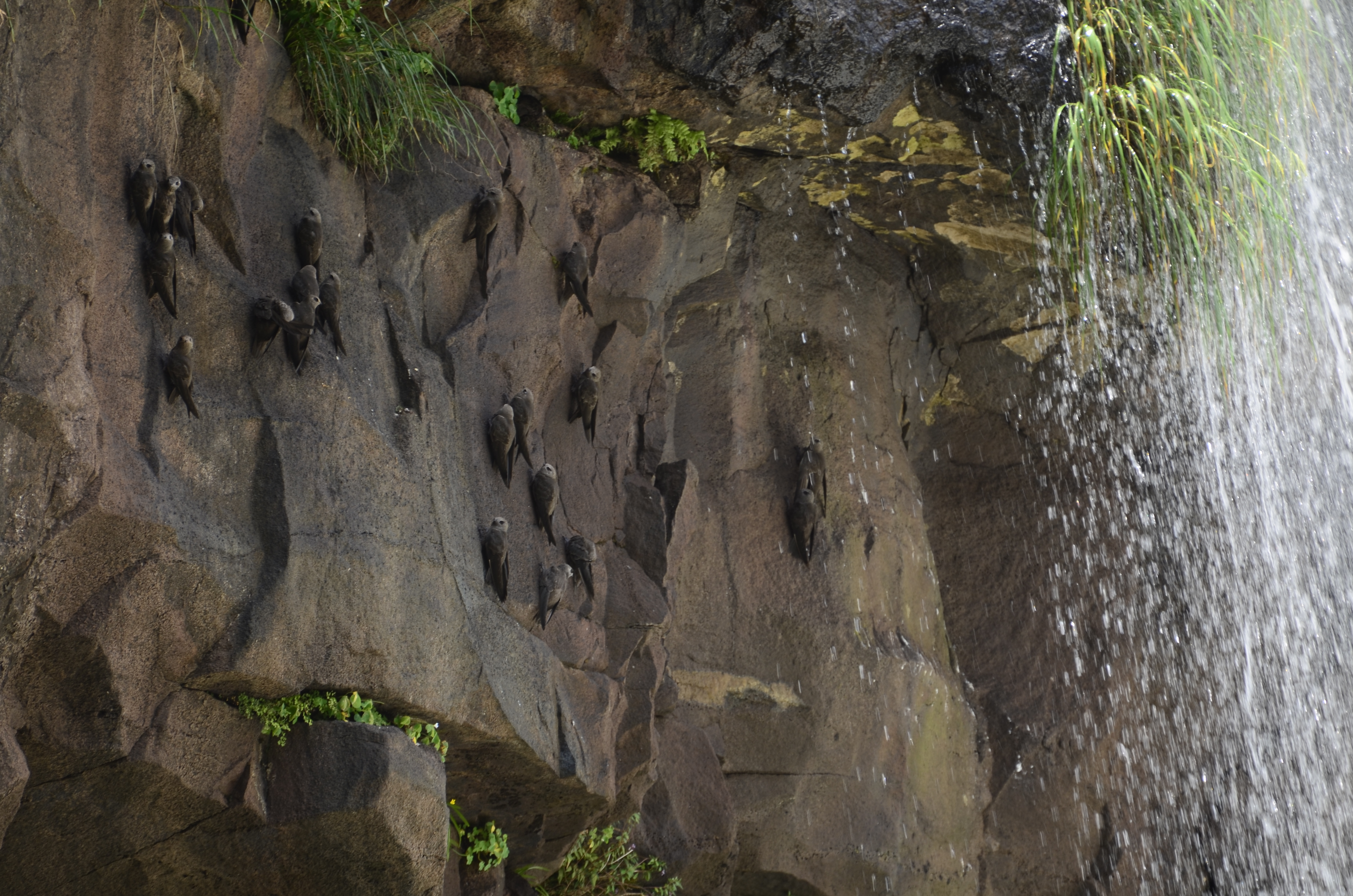 O taperuçu-velho, também conhecido como andorinhão-velho e andorinhão-de-cascata. Comprimento total: 18 centímetros. Vivem em bandos, se abrigam nas rochas em quedas d’água, como nas cataratas do Iguaçú na cidade de Foz do Iguaçú-PR